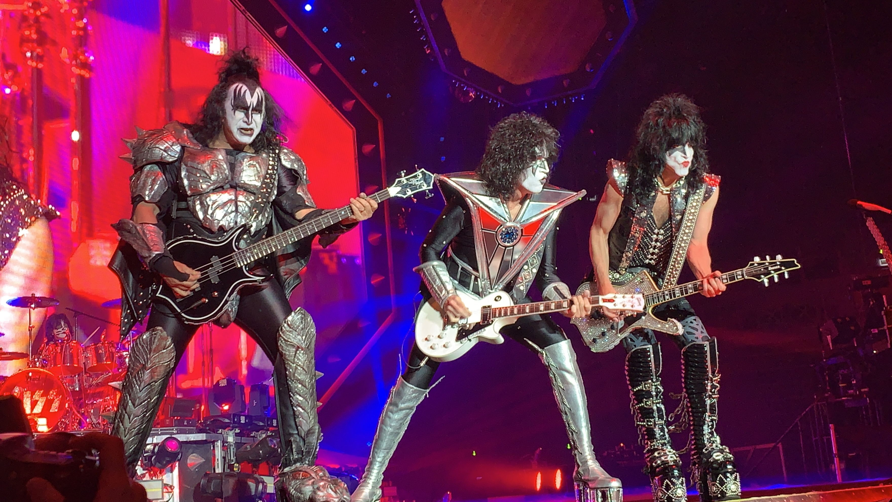 Kiss na koncercie w Krakowie 18 czerwa 2019